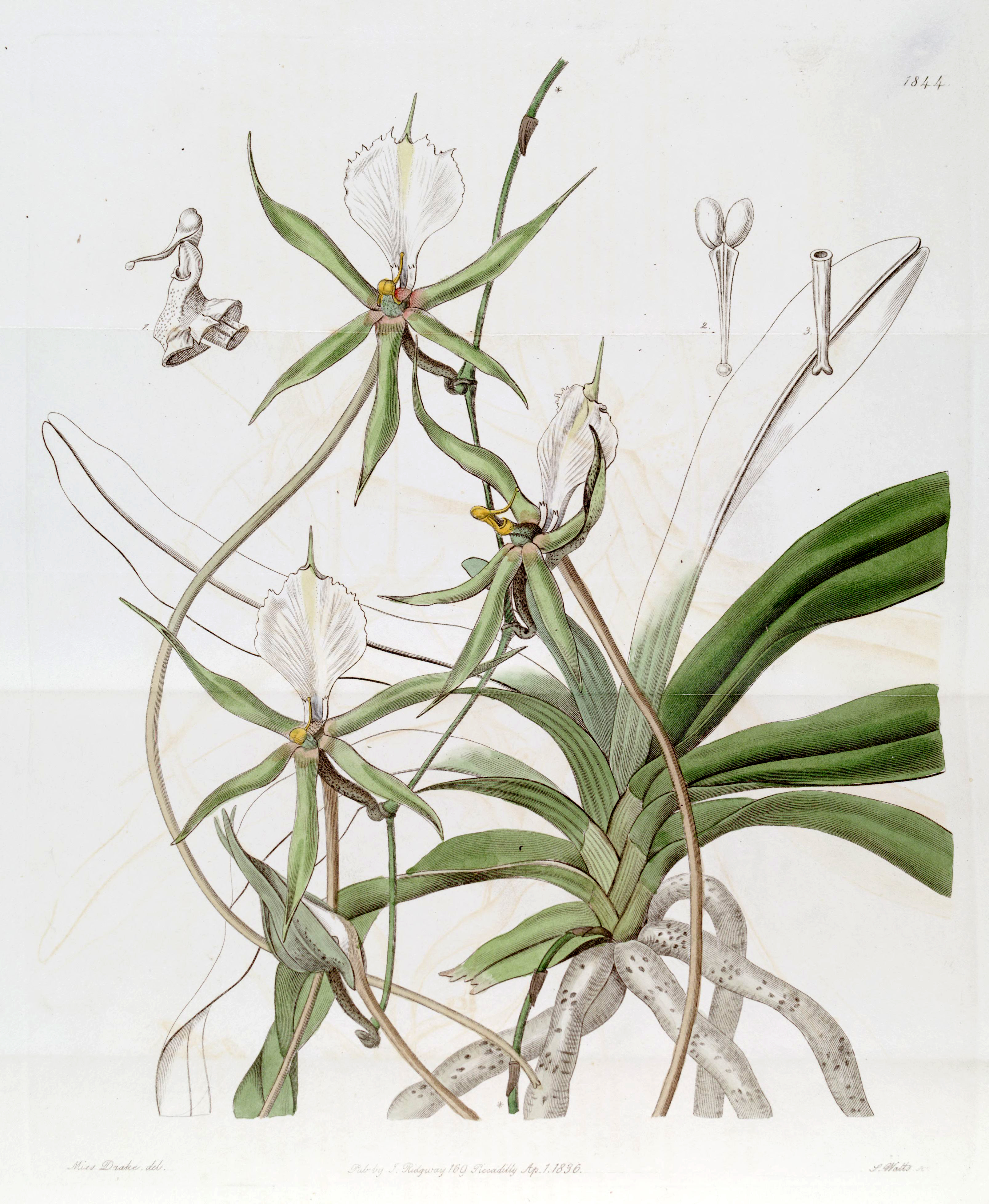 Plectrelminthus caudatus (as syn. Angraecum caudatum)